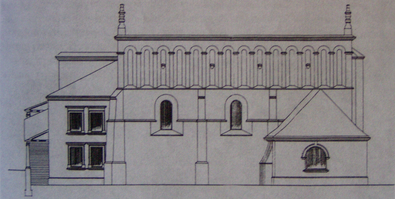 Projekt przebudowy więźby dachowej oraz restauracji attyki Starej Synagogi w Krakowie (1913)